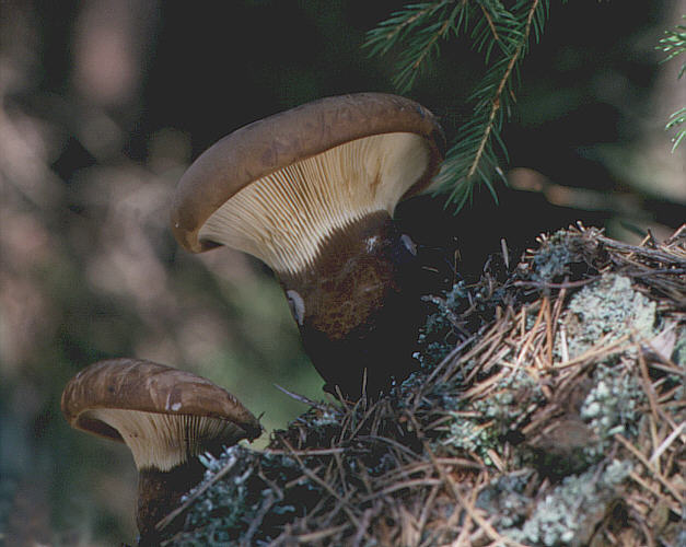 Samtfusskrempling